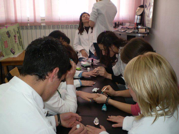 Козметички техничар